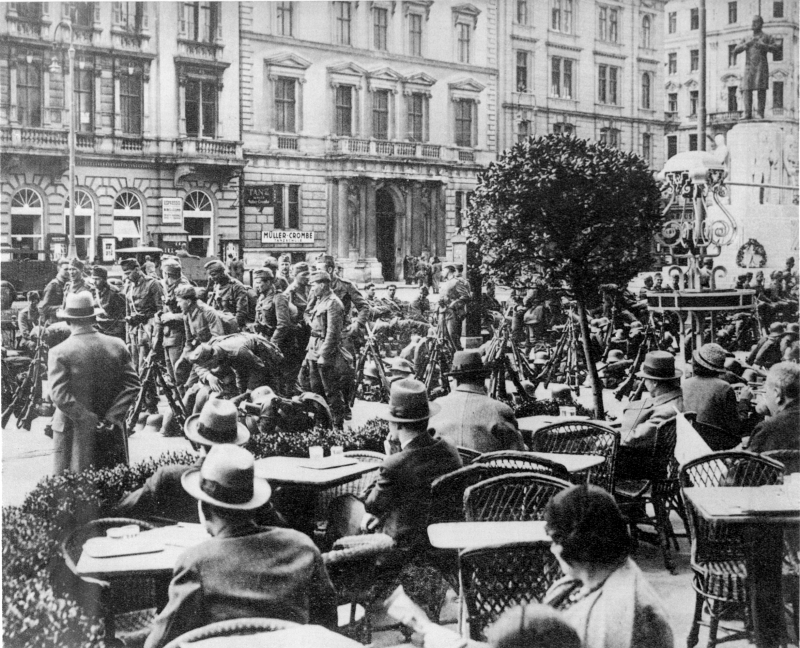 Zernierung des Zugangs zum Luegerplatz durch das Bundesheer; davor Gäste im Café Prückl.